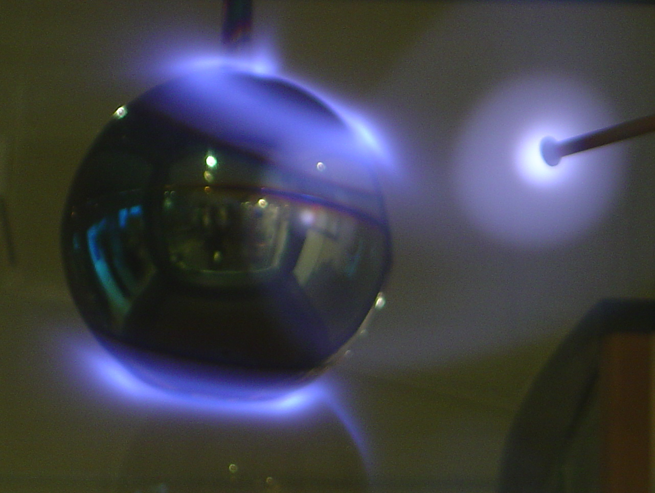 Université Paris-Sud (Orsay) Journées de la Science 2005 An electrical experiment